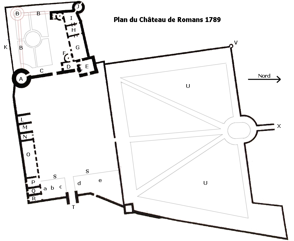 Plan du château de Romans (Ain) en 1789